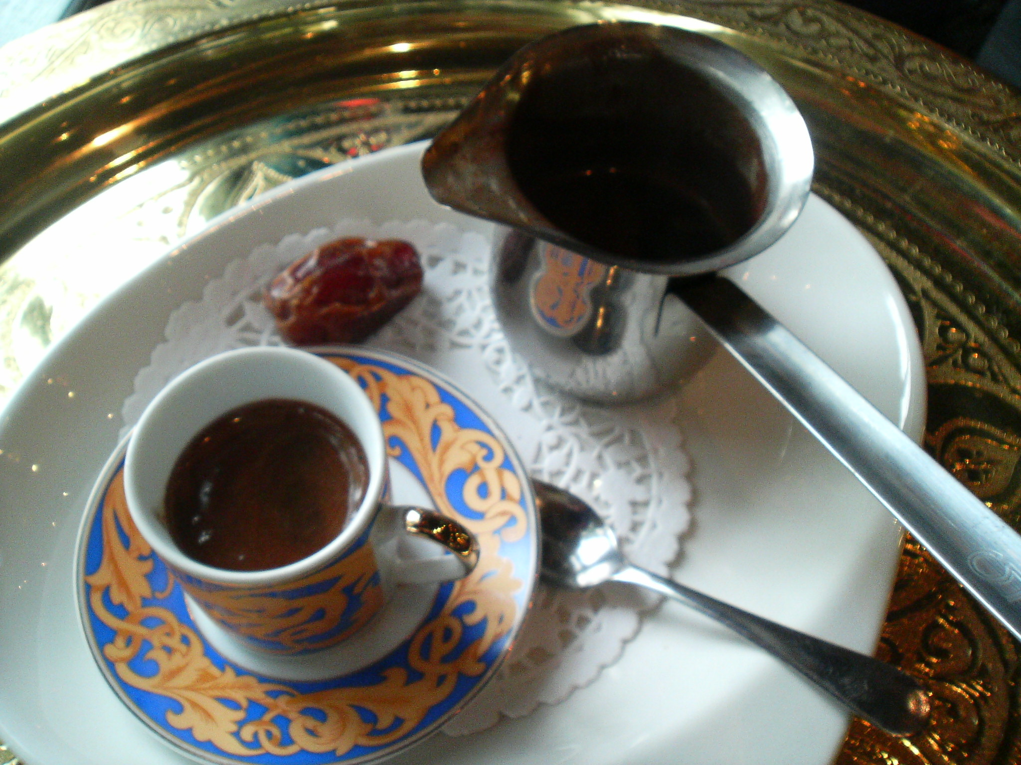 at a cafe